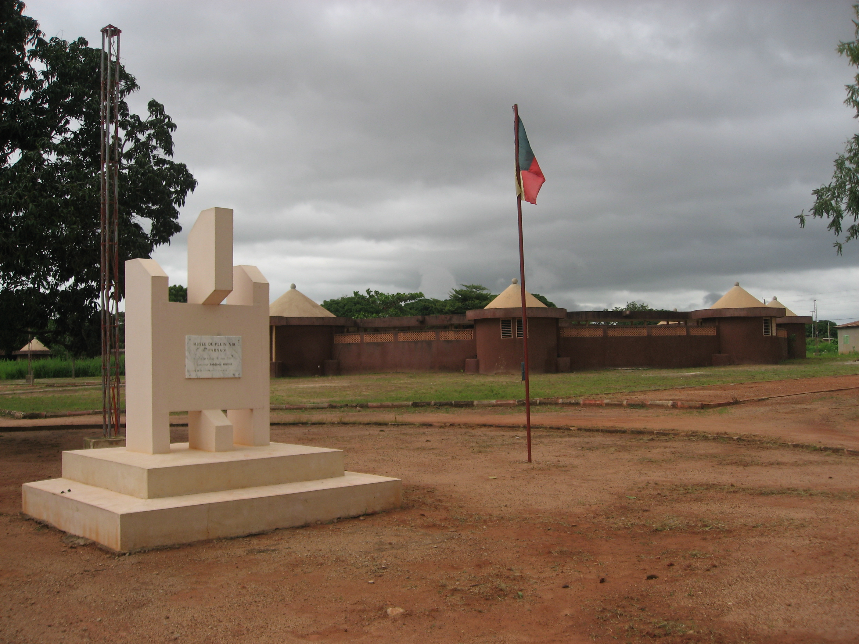 Musée en Plein AirParakou, Benin